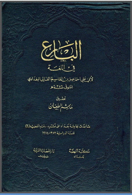 (البارع) من أوسع كتب اللغة العربية